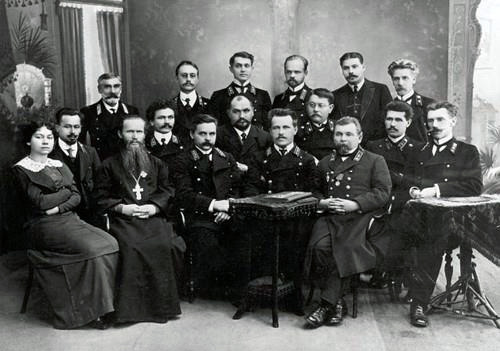 Михаил Алексеевич Васильев (1862, Камышлов — после января 1916) — городской голова Камышлова, депутат III Государственной думы от Пермской губернии (1907-1912).